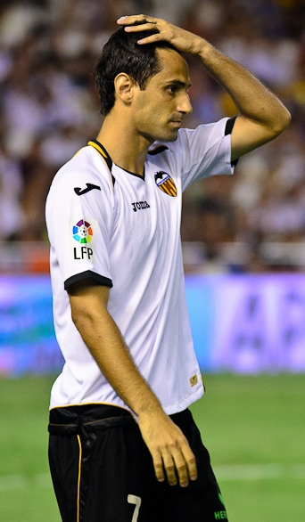 El jugador merengot Jonas Golçalves